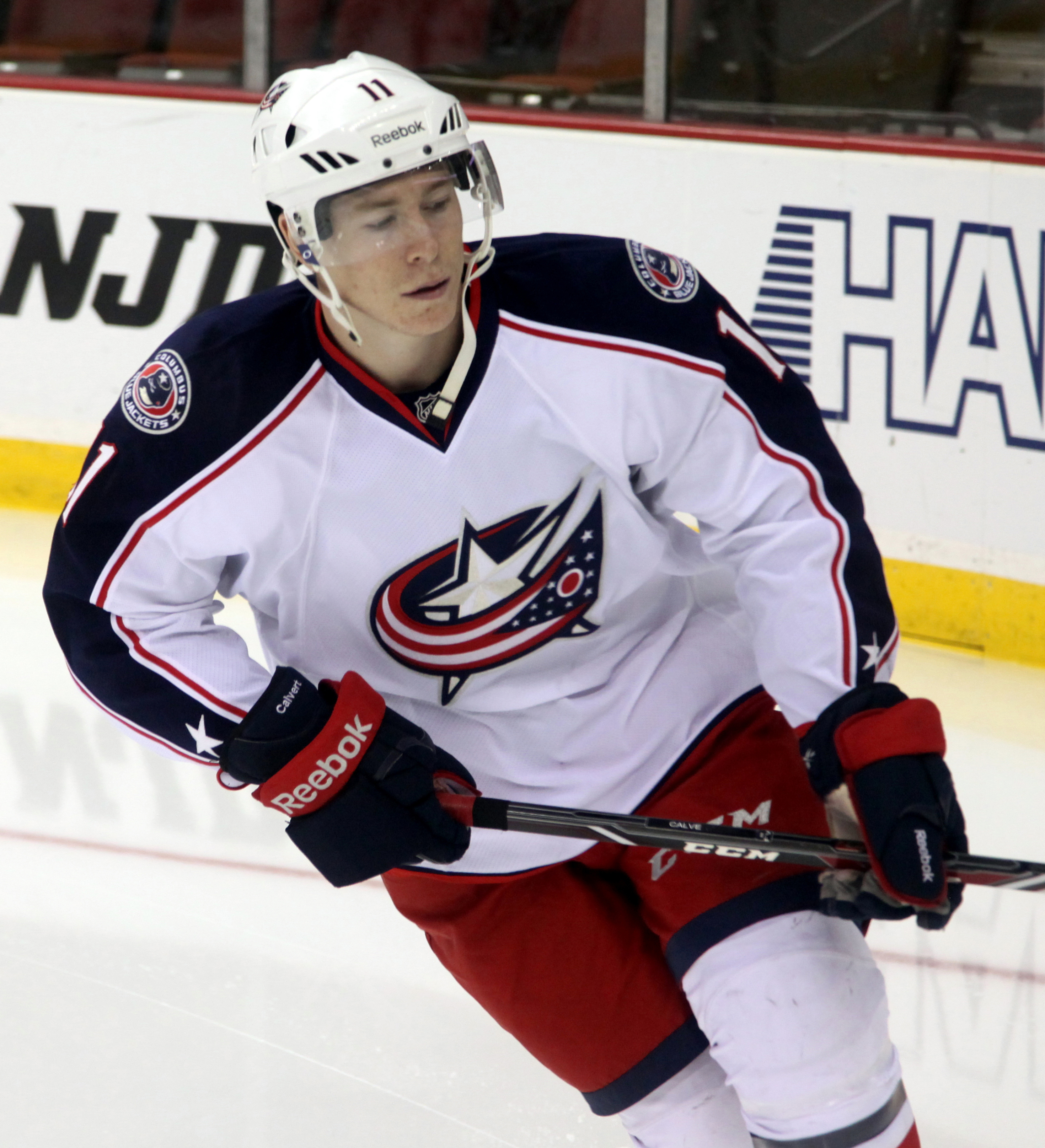 Calvert in 2014.